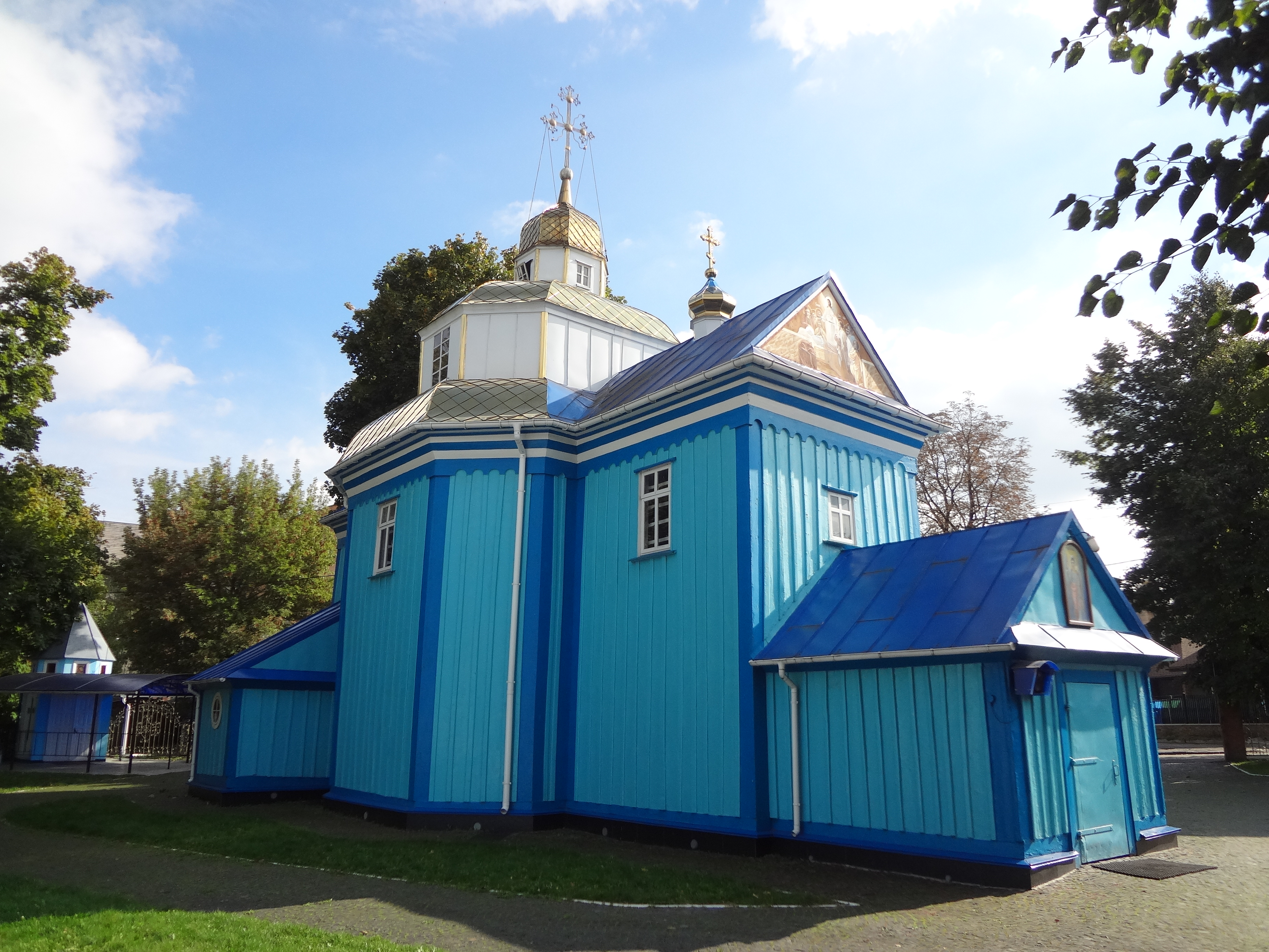 Успенська церква (дер.), Рівне, вул.Шевченка, 113